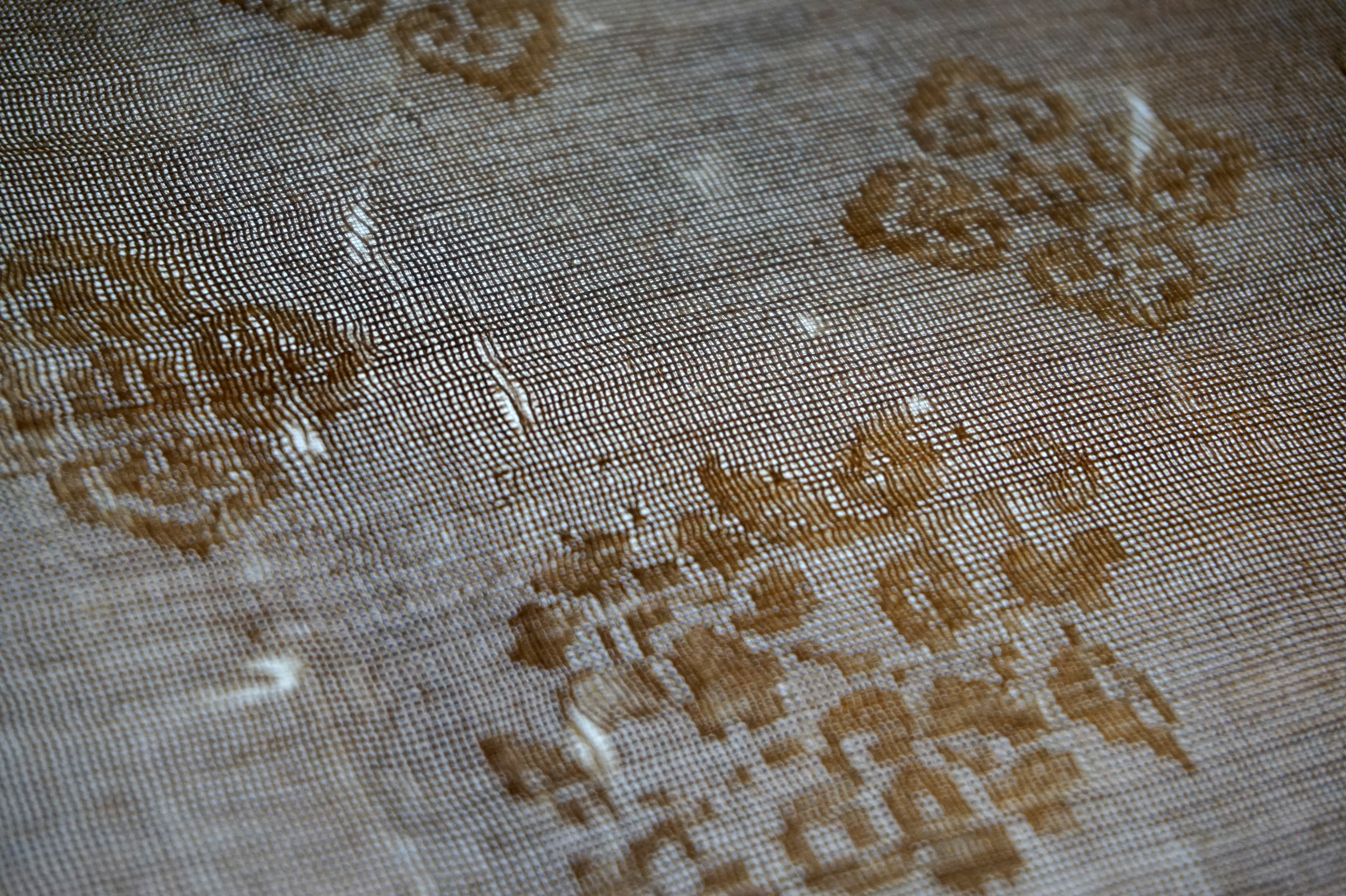 南宋咸淳十年（1274）黄褐色如意山茶暗花罗。江西德安周氏墓出土，中国丝绸博物馆藏。